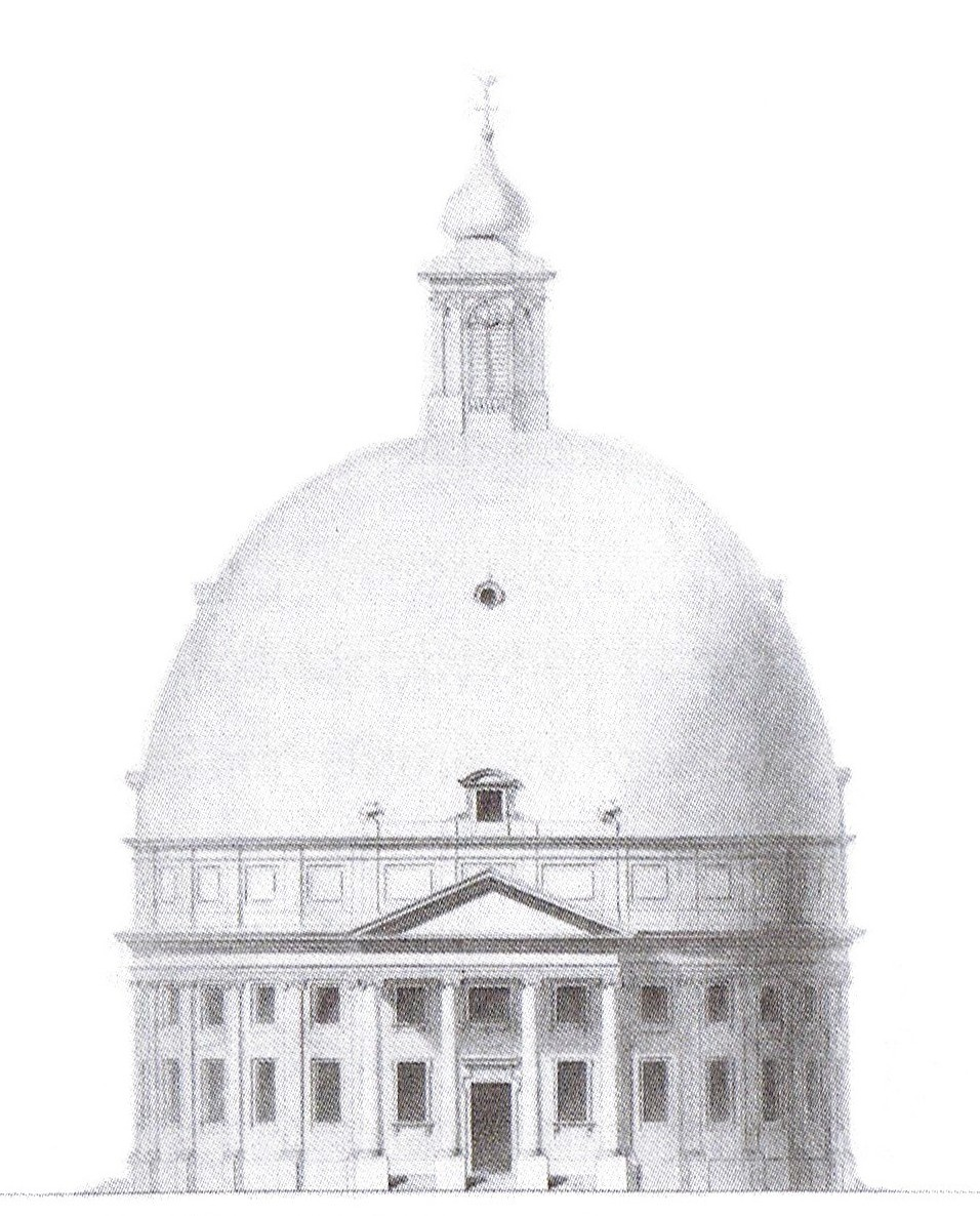 Projet d'église simultanée au Loo (projet de F.L. Gunckel en 1810. On peut trouver cette image dans l'étude d'Annie Jourdan, Louis Bonaparte, roi de Hollande.